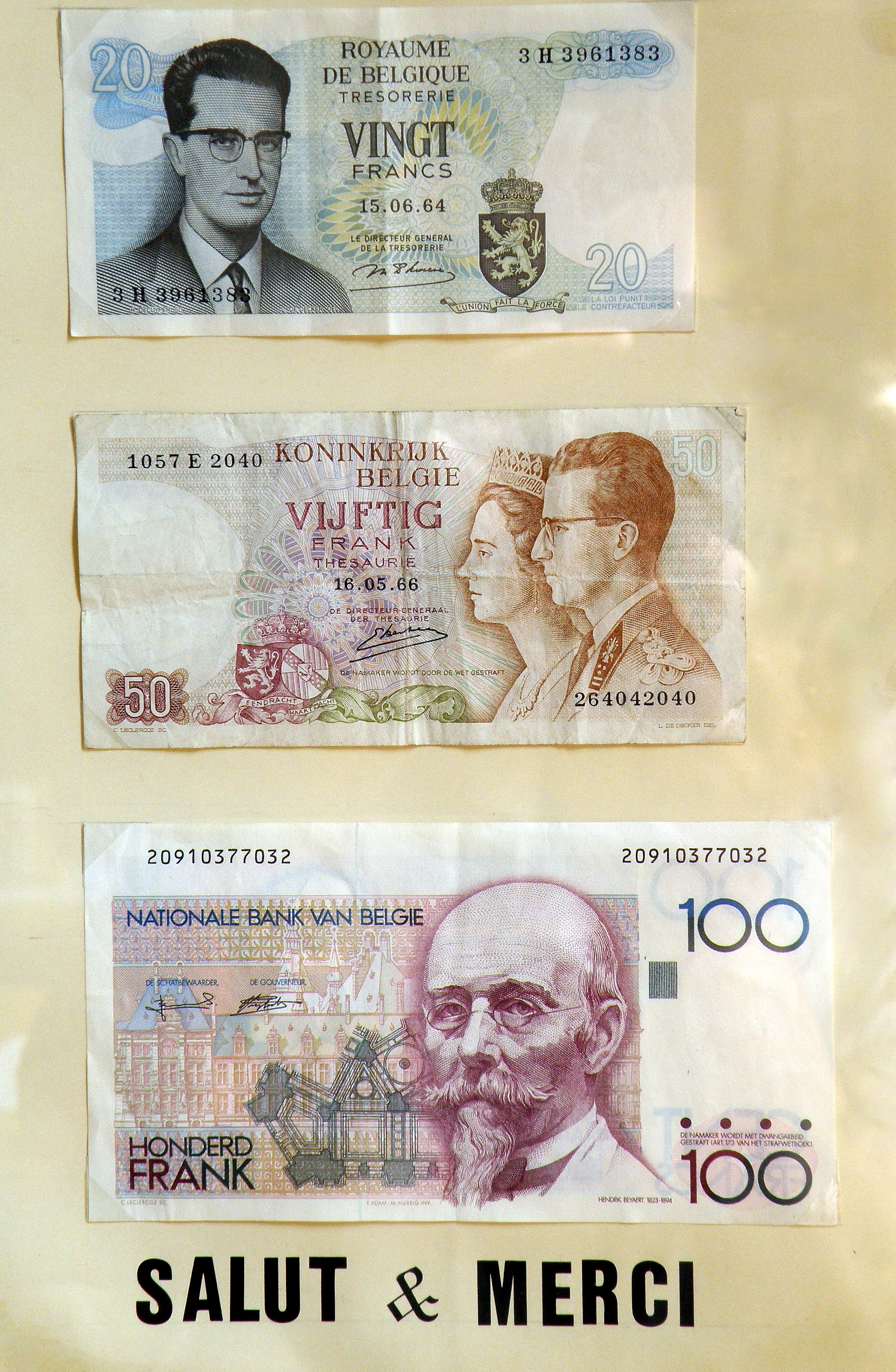 Franc belge. Billets de 20, 50 et 100 francs. Photo prise en 2011 dans un estaminet de Wilrijk, Anvers.